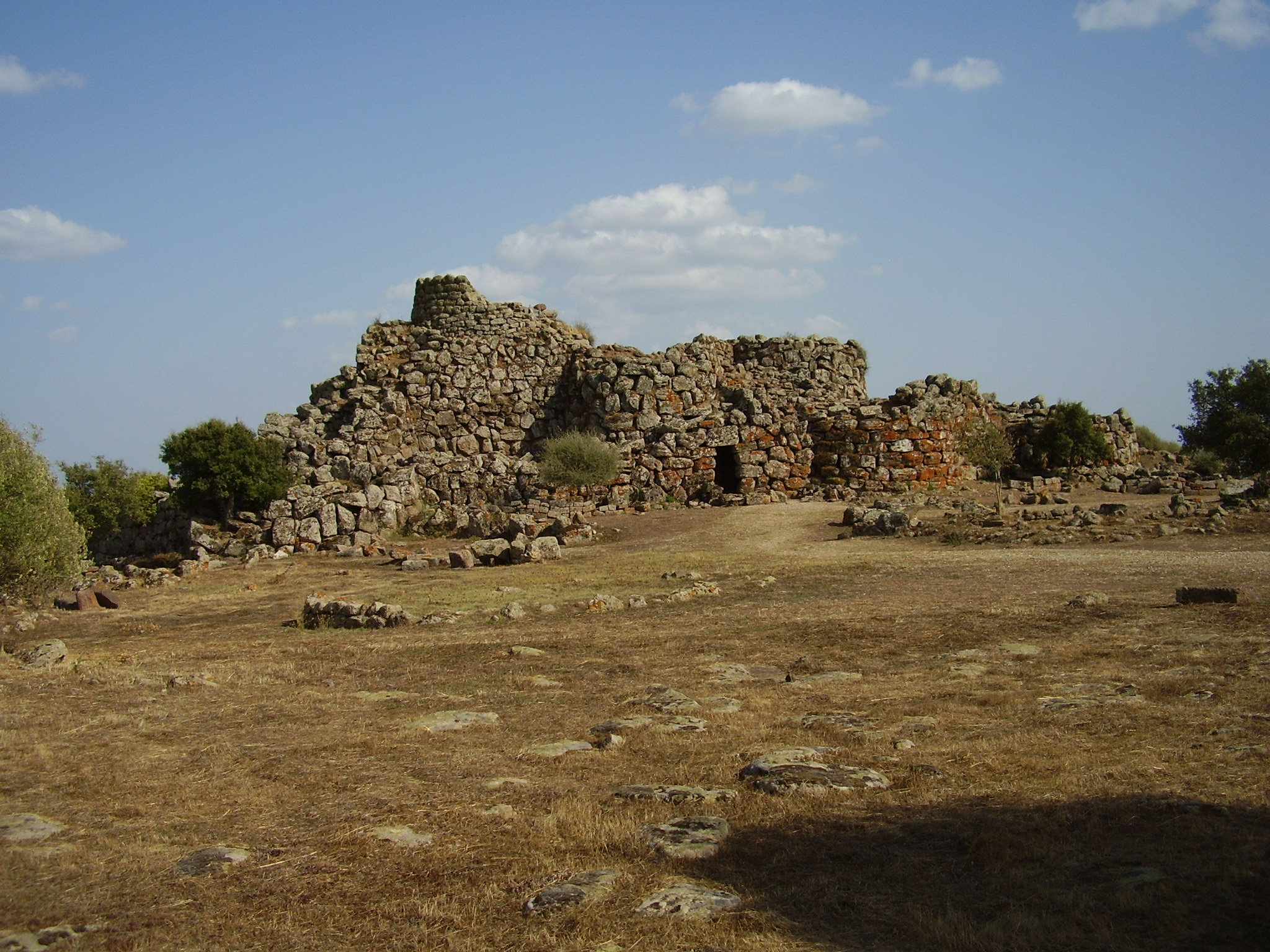 Nuraghe Arrubiu - MIBAC This is a photo of a monument which is part of cultural heritage of Italy.